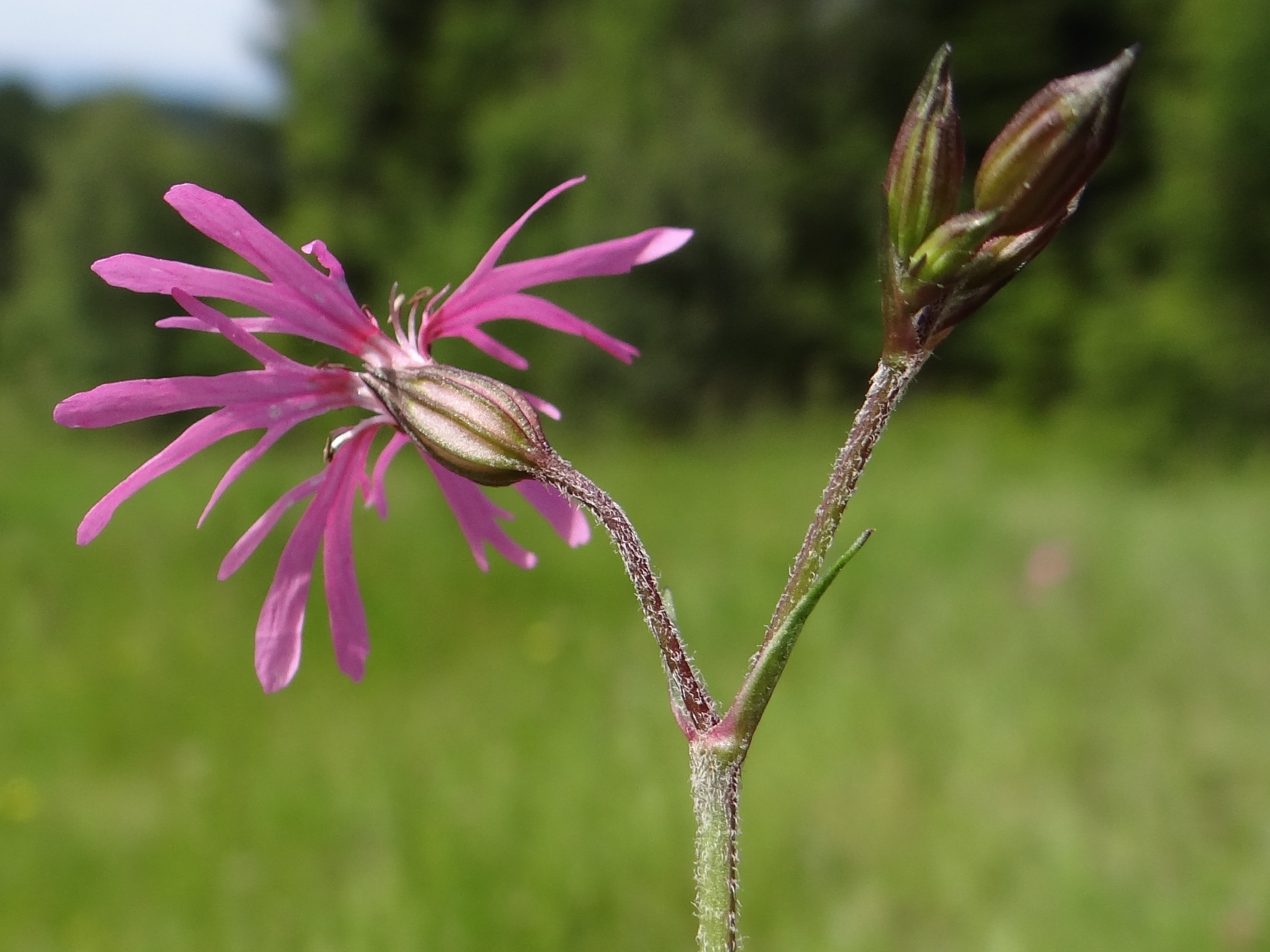 Lychnis flos-cuculi